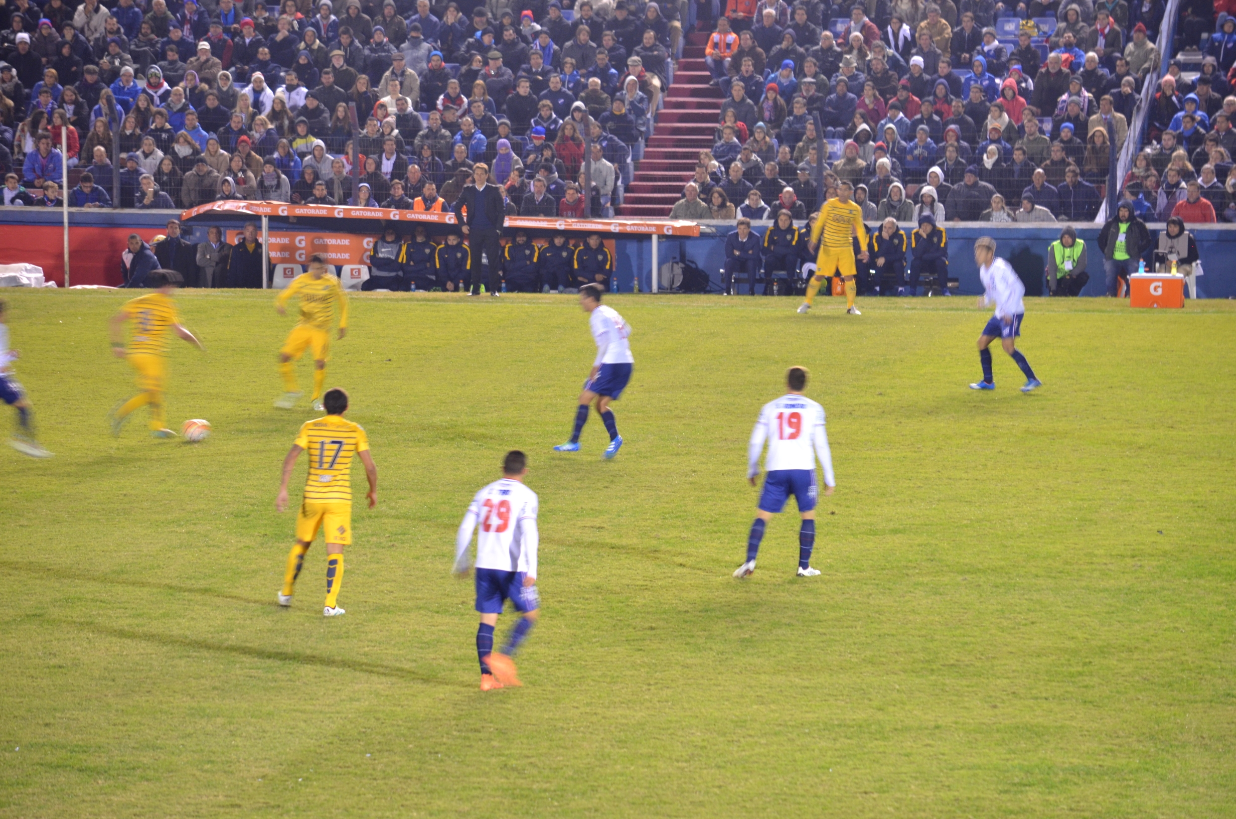 Imagen del partido disputado entre Nacional y Boca Juniors, en el estadio Gran Parque Central, por los cuartos de final de la Copa Libertadores 2016